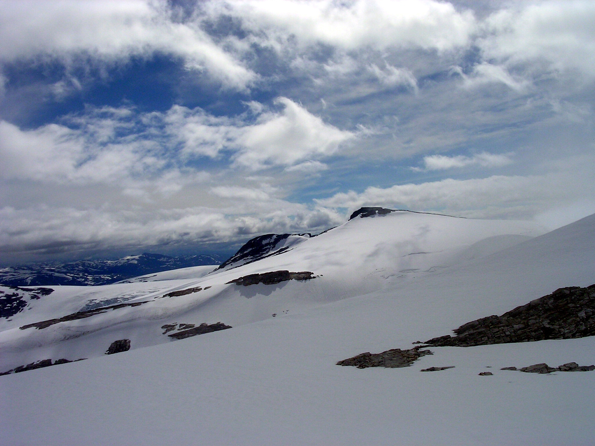 Brenibba 2018 moh. Luster. Bildet er tatt fra nord oppunder Veslekåpa.